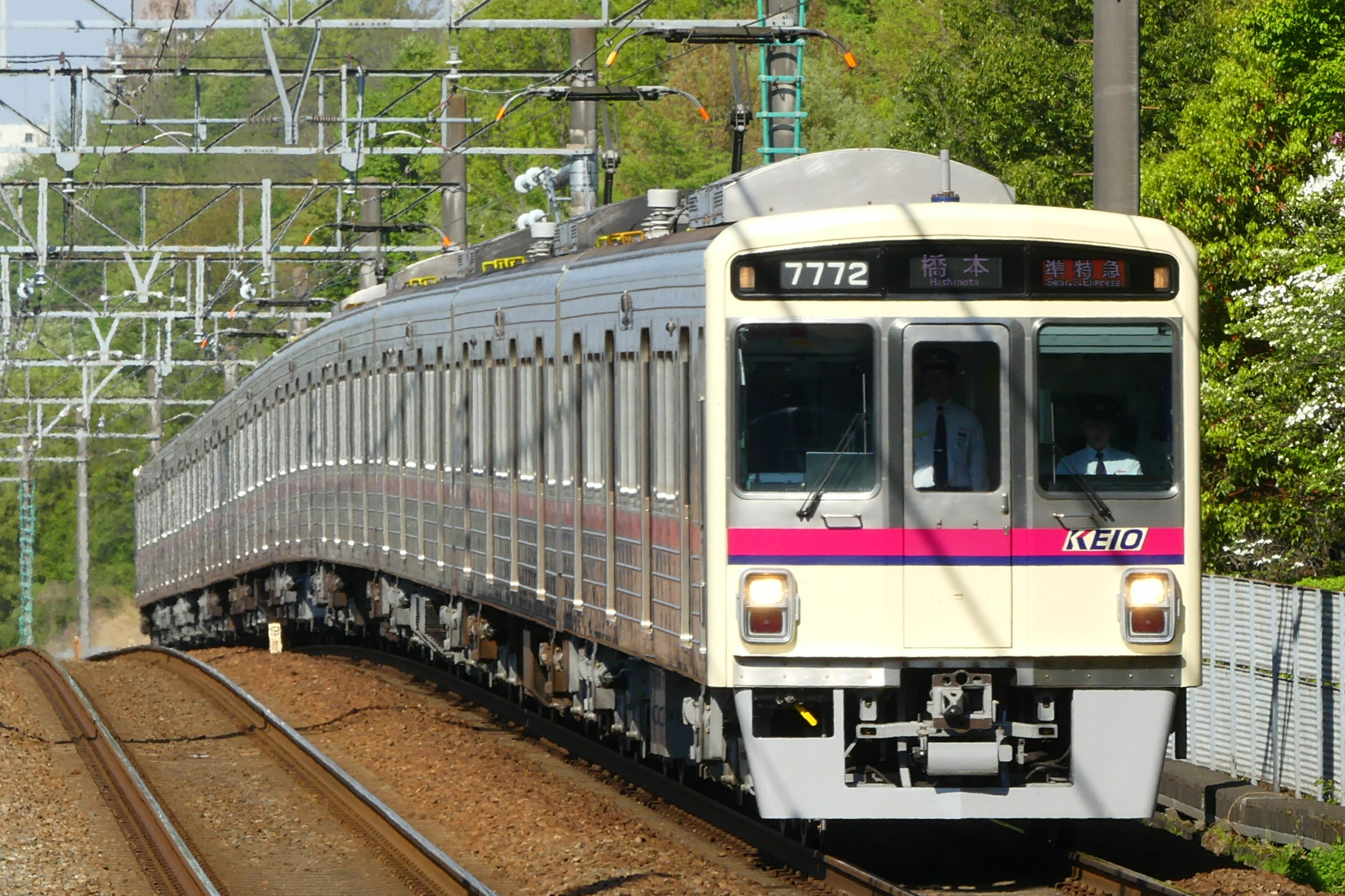 京王電鉄7000系電車